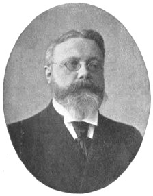 Professoren der medizinischen Fakultät der Universität Berlin: Friedrich Jolly